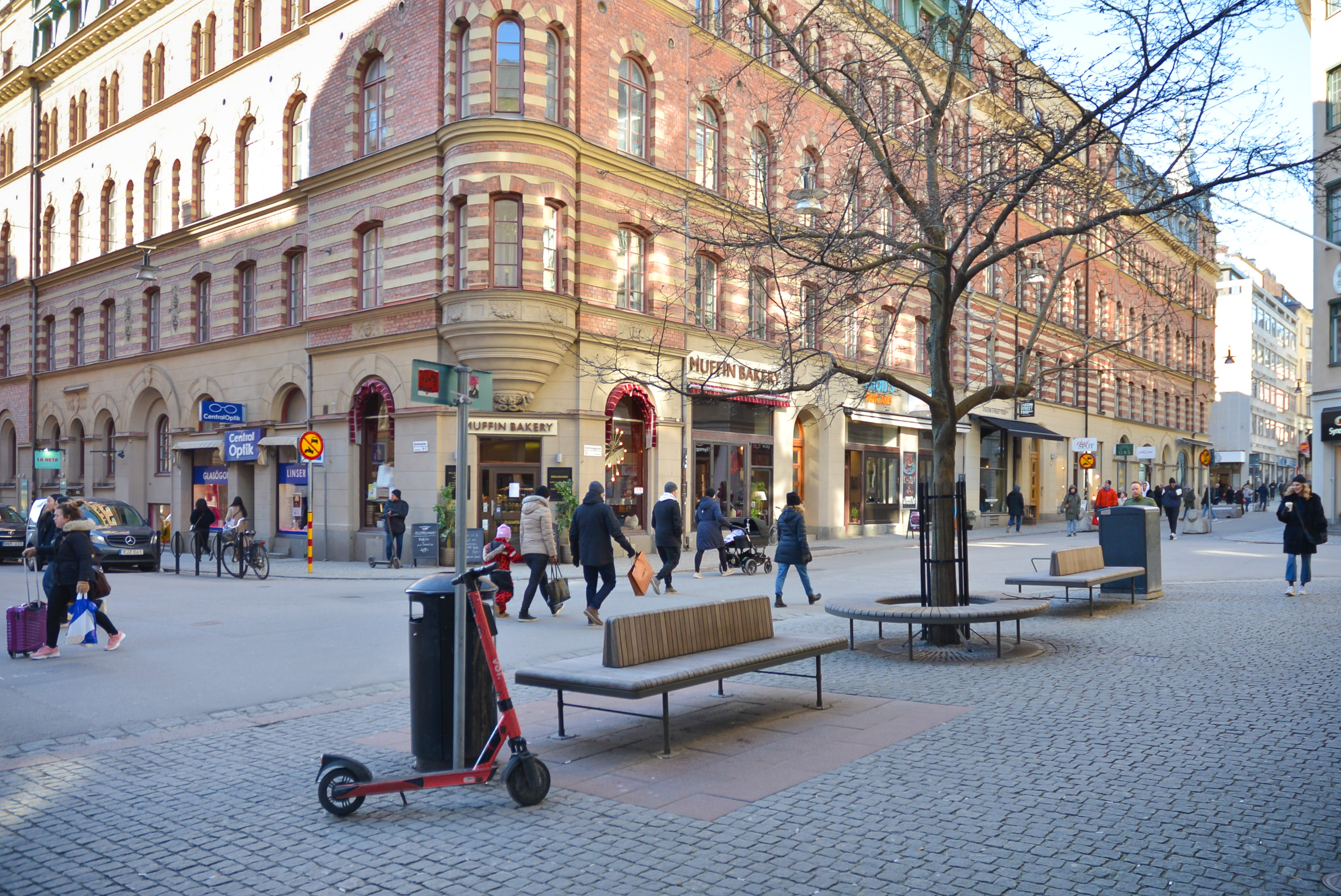 Peter Weiss plats i centrala Stockholm i korsningen Drottninggatan - Barnhusgatan - Adolf Fredriks Kyrkogata.